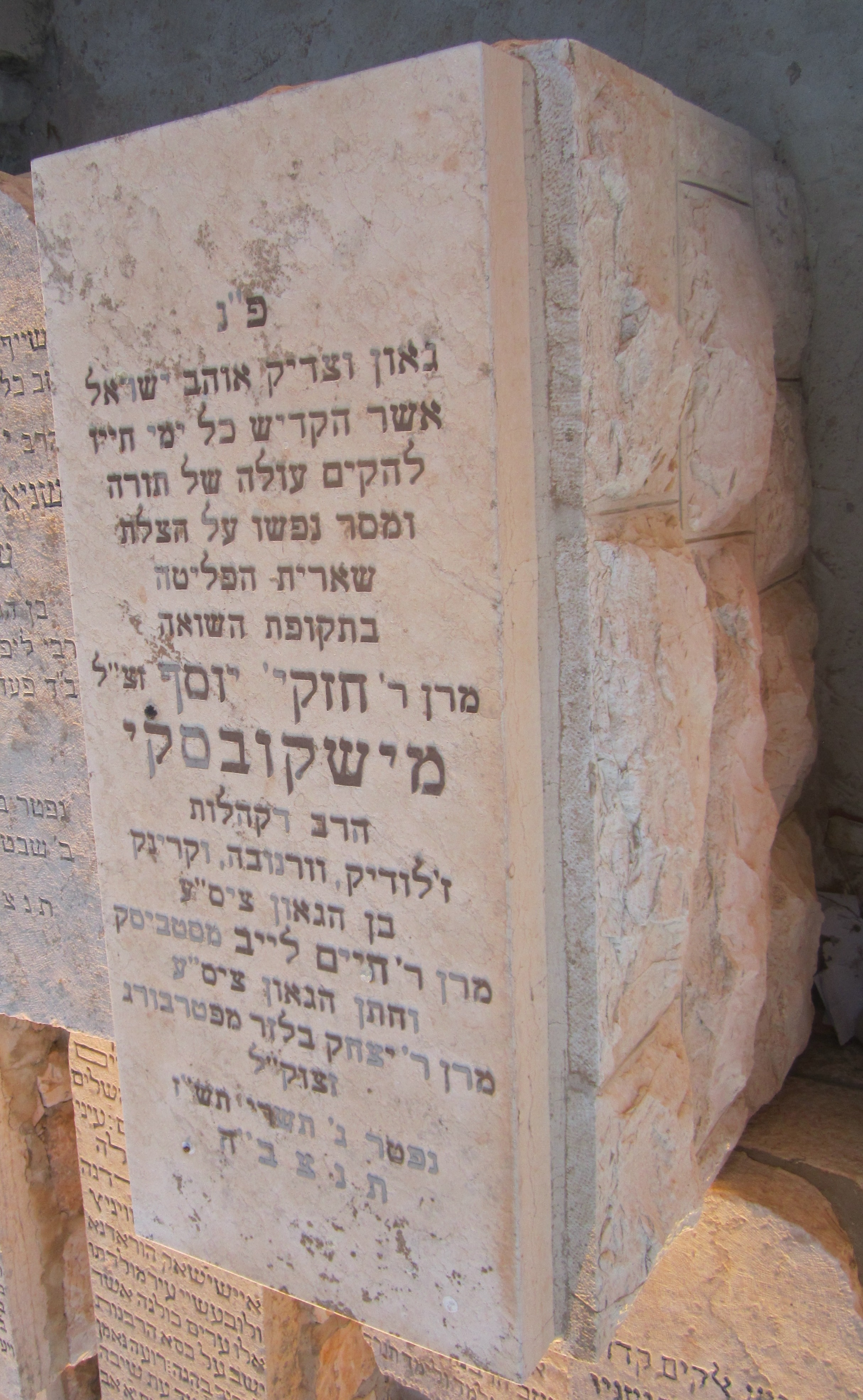 קבר הרב חזקיהו יוסף מישקובסקי בהר הזיתים